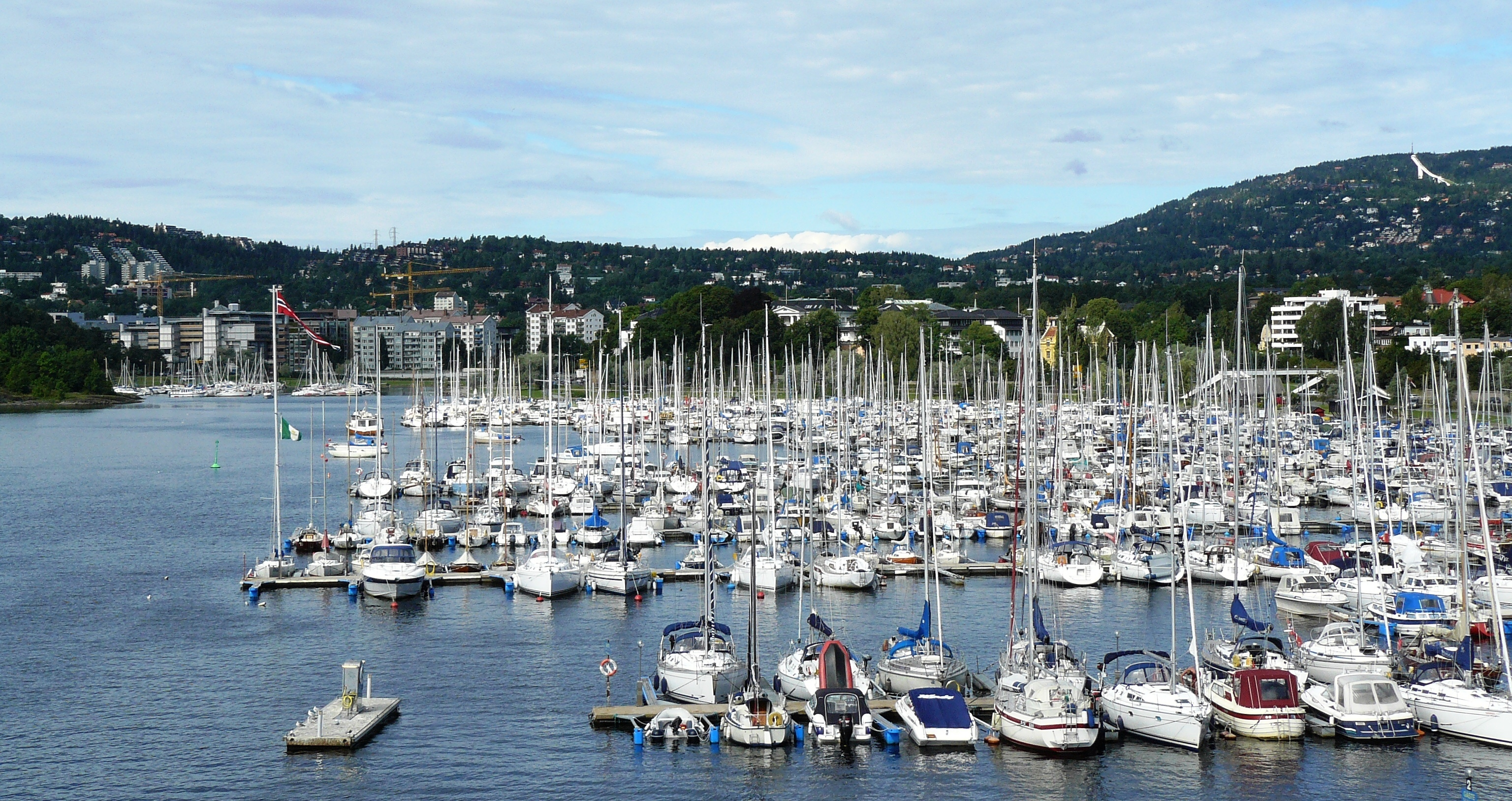 Frognerkilen, in the Oslofjord